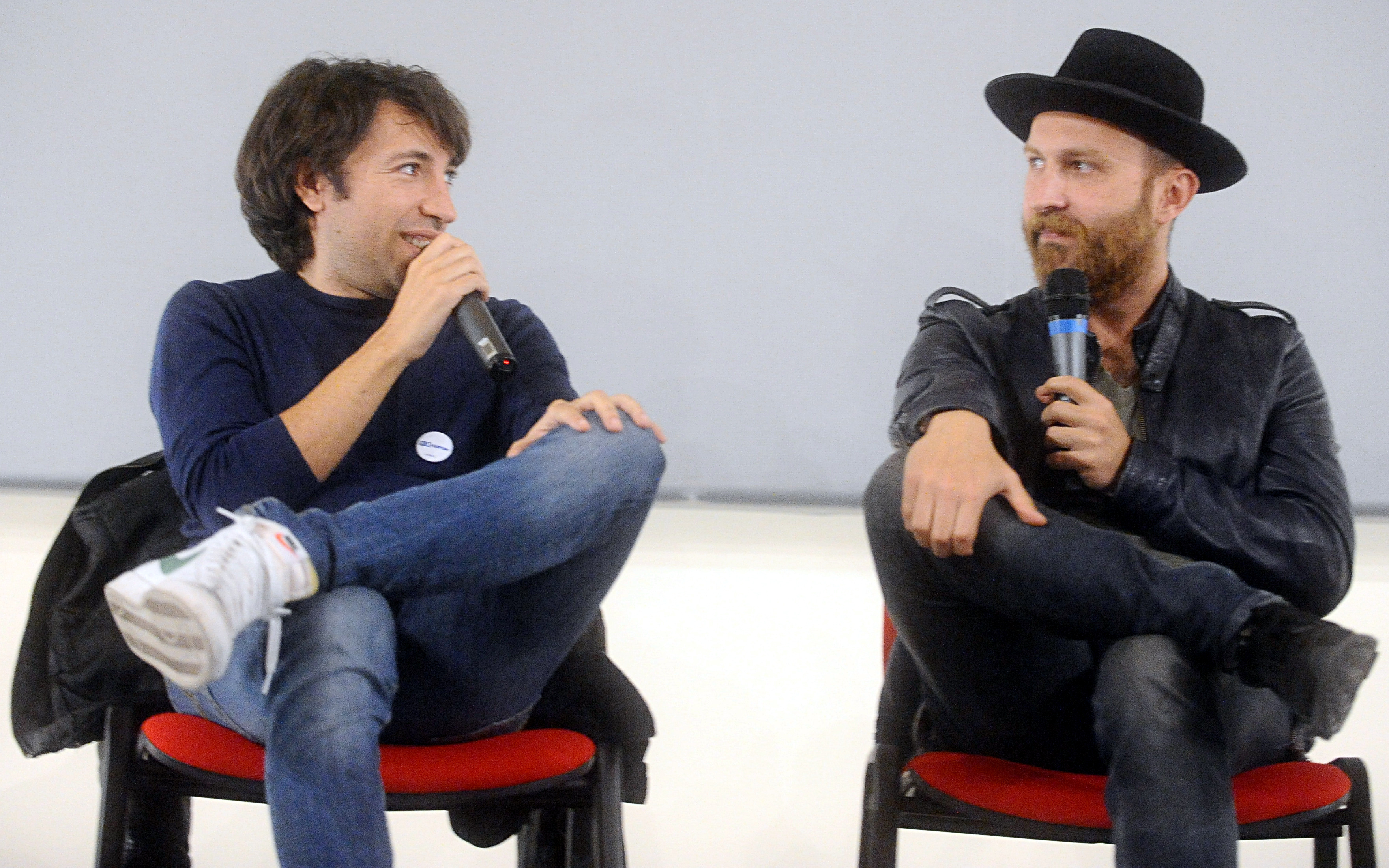 Herbert Ballerina (Luigi Luciano) e Maccio Capatonda (Marcello Macchia) a Lucca Comics & Games 2016. Cinema Astra.